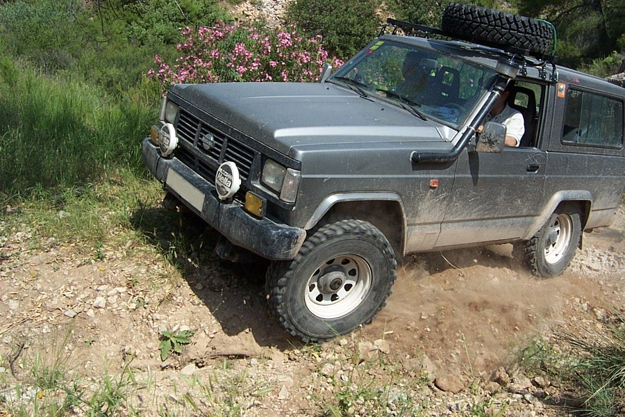 Nissan Patrol, modelo clásico.